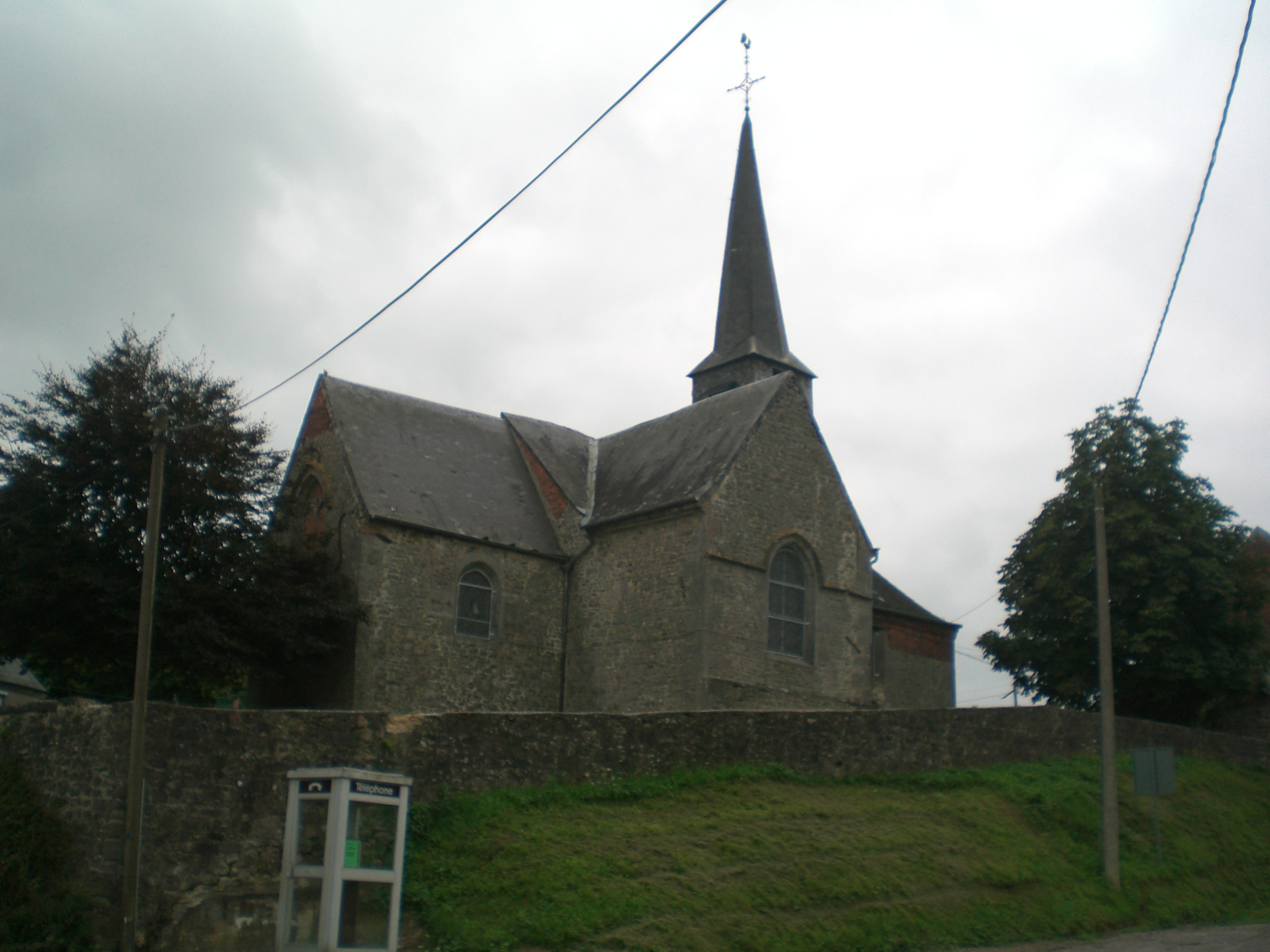 eglise de dimechaux nord france